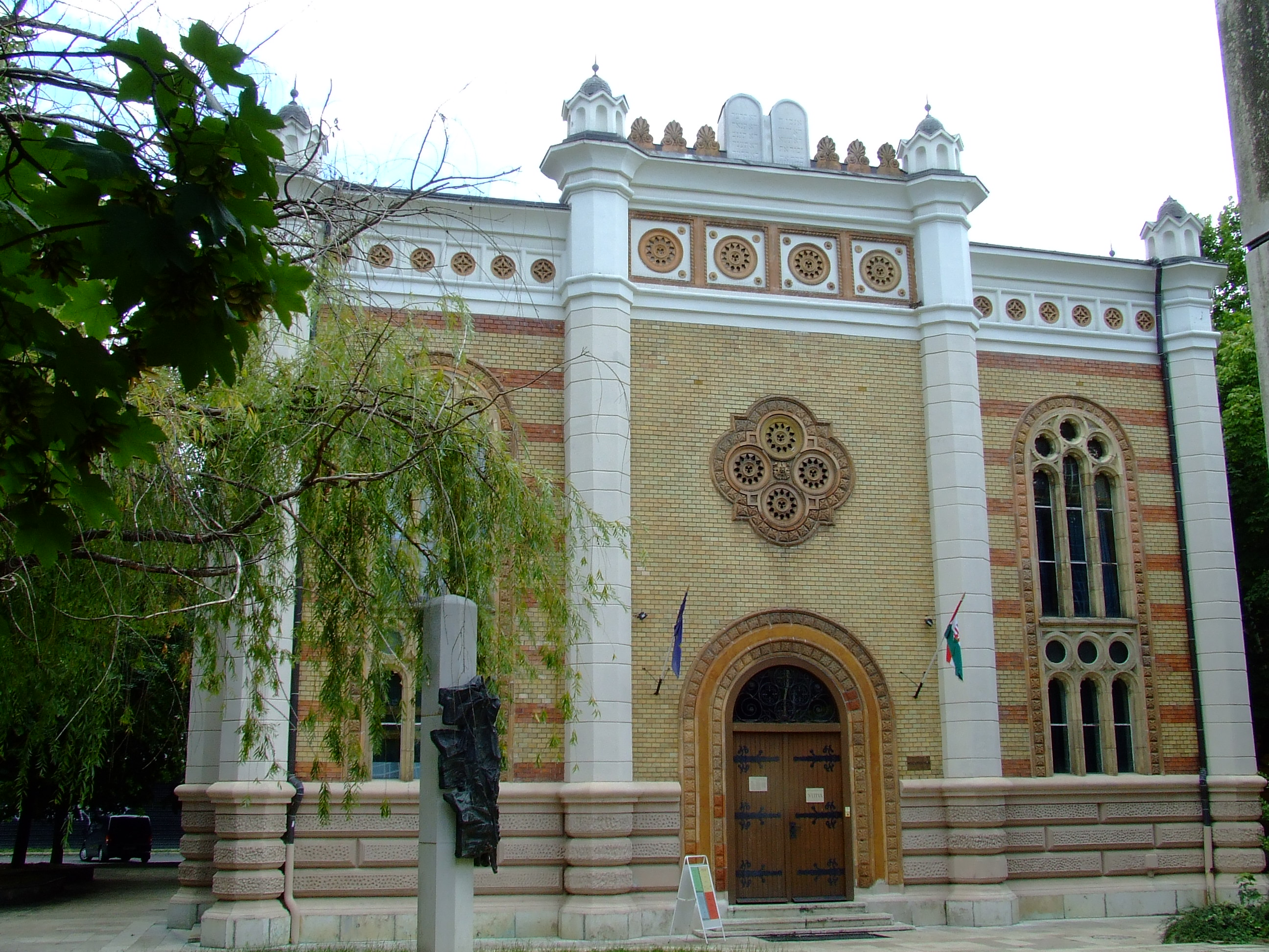 A szekszárdi zsinagóga épülete. Épült 1897-ben, Hans (Johann) Petschnigg grazi építész tervei szerint. Belső terét Kerényi József építész tervei alapján alakították át az 1980-as években. Ma Művészetek Háza (műemlék; törzsszám: 9000;azonosító: 8761). - Tolna m., Szekszárd, Szent István tér 28.